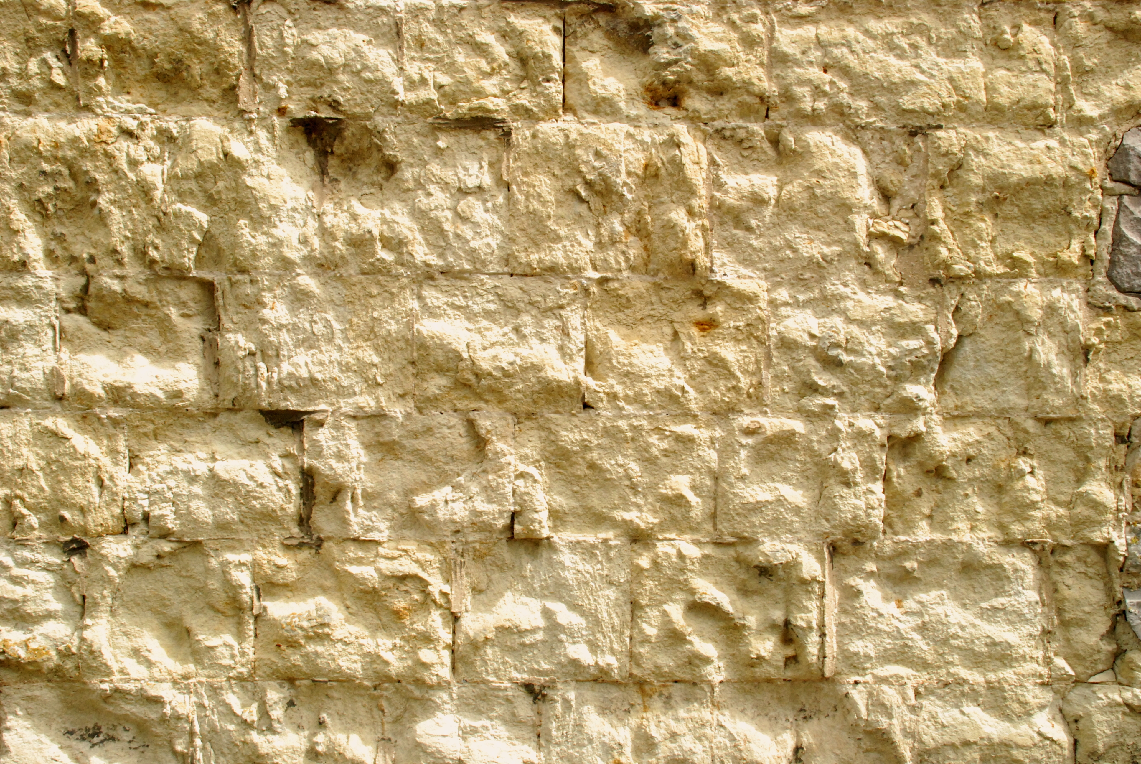 Belgique - Brabant wallon - Hélécine - Linsmeau - Église Saint-Pierre